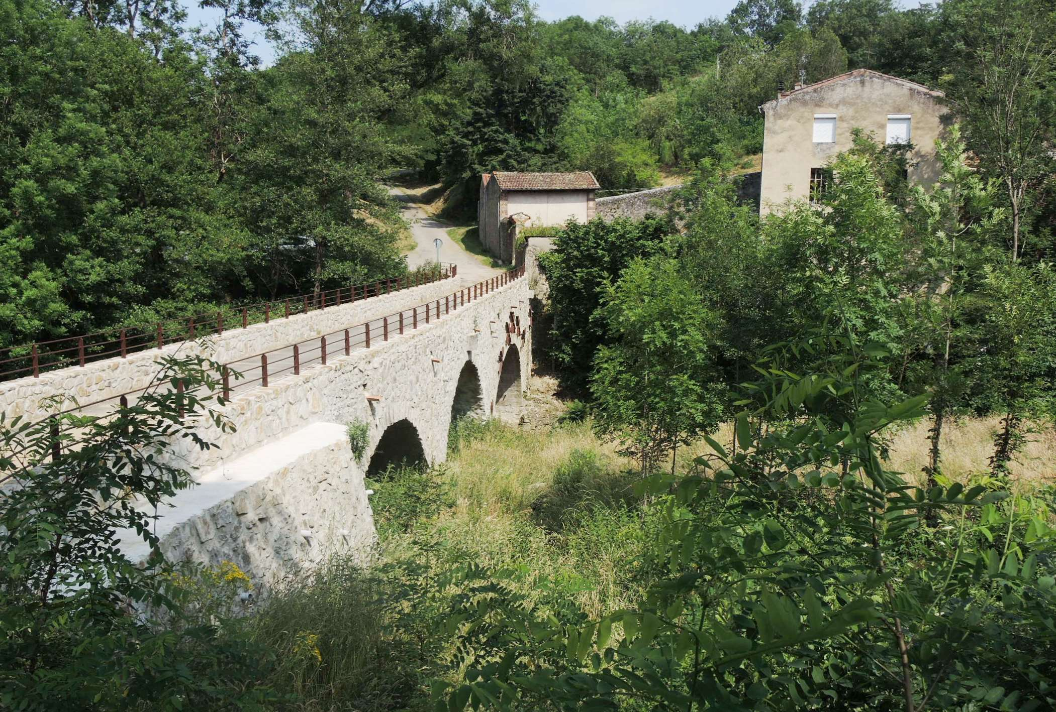 Vinzieux détail